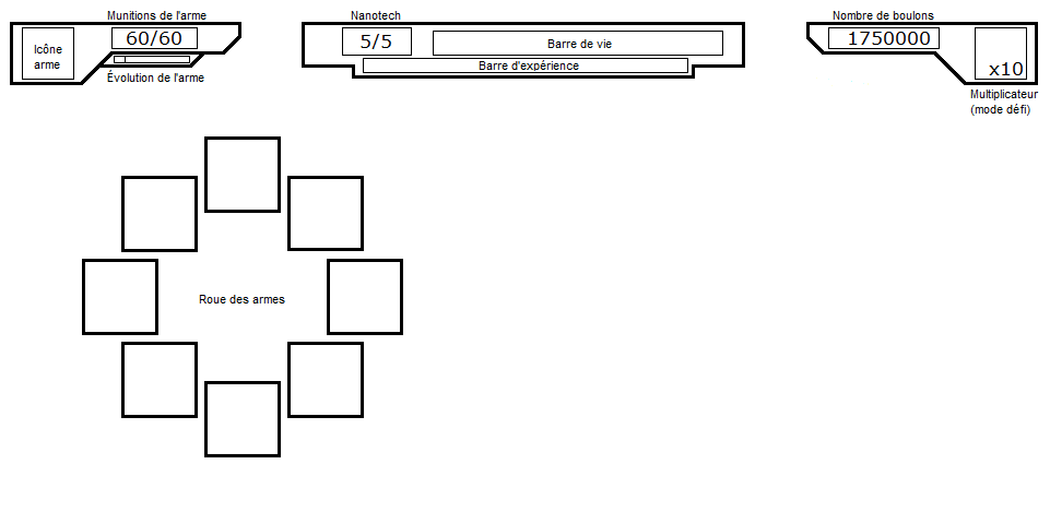 Reproduction de l'affichage tête haute (ATH) du jeu vidéo Ratchet and Clank: La taille, ça compte.